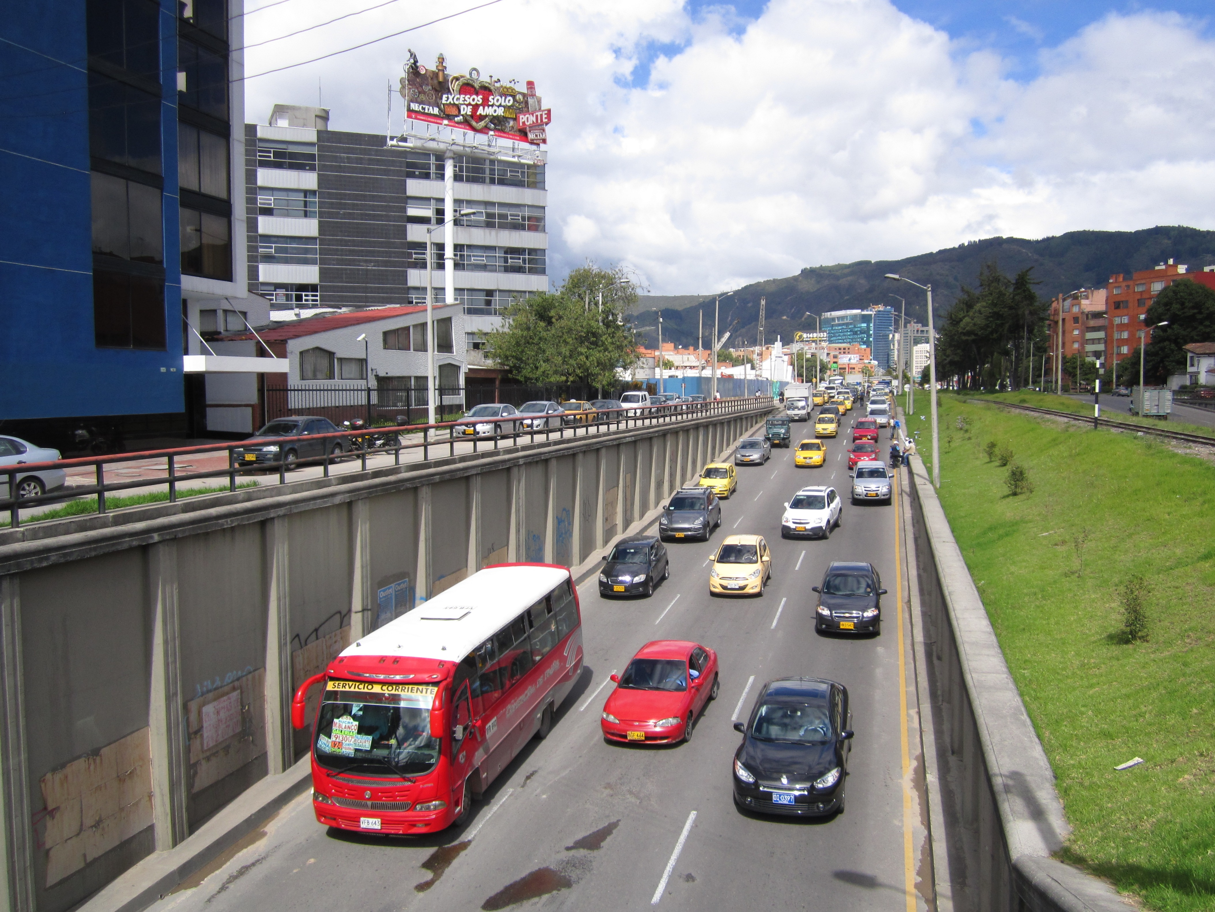 Bogotá NQS Carrera 15